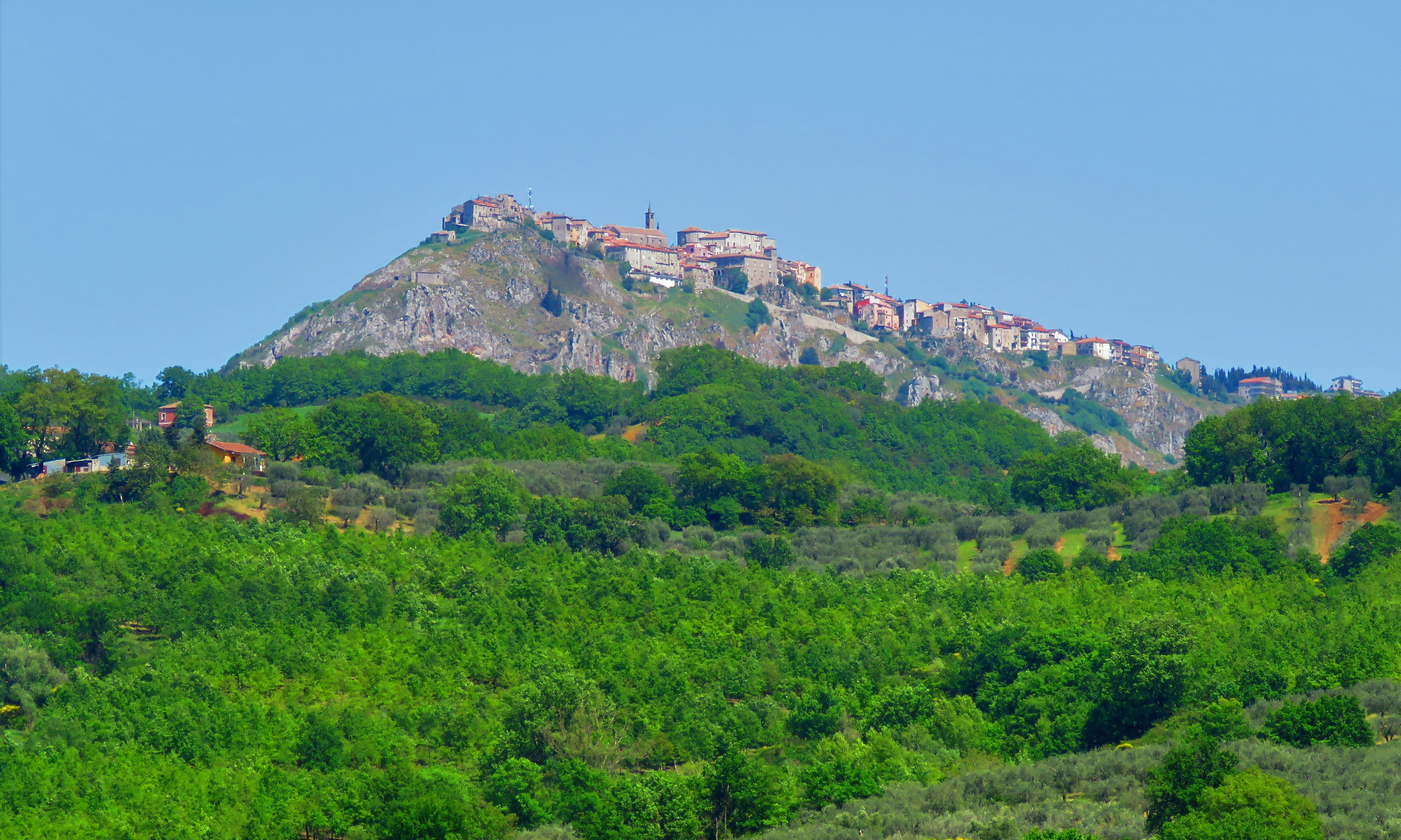 Auletta